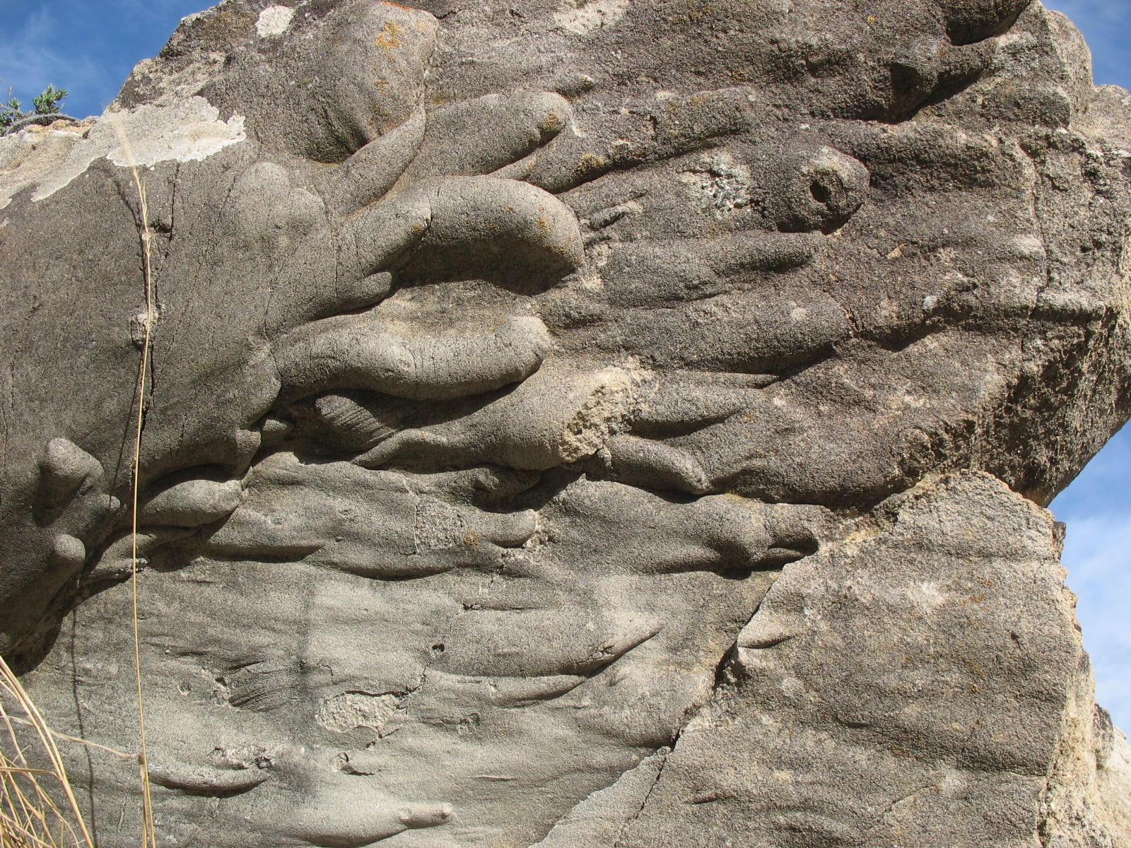 Flute cast. Triásico de Riba de Santiuste (Guadalajara, España)